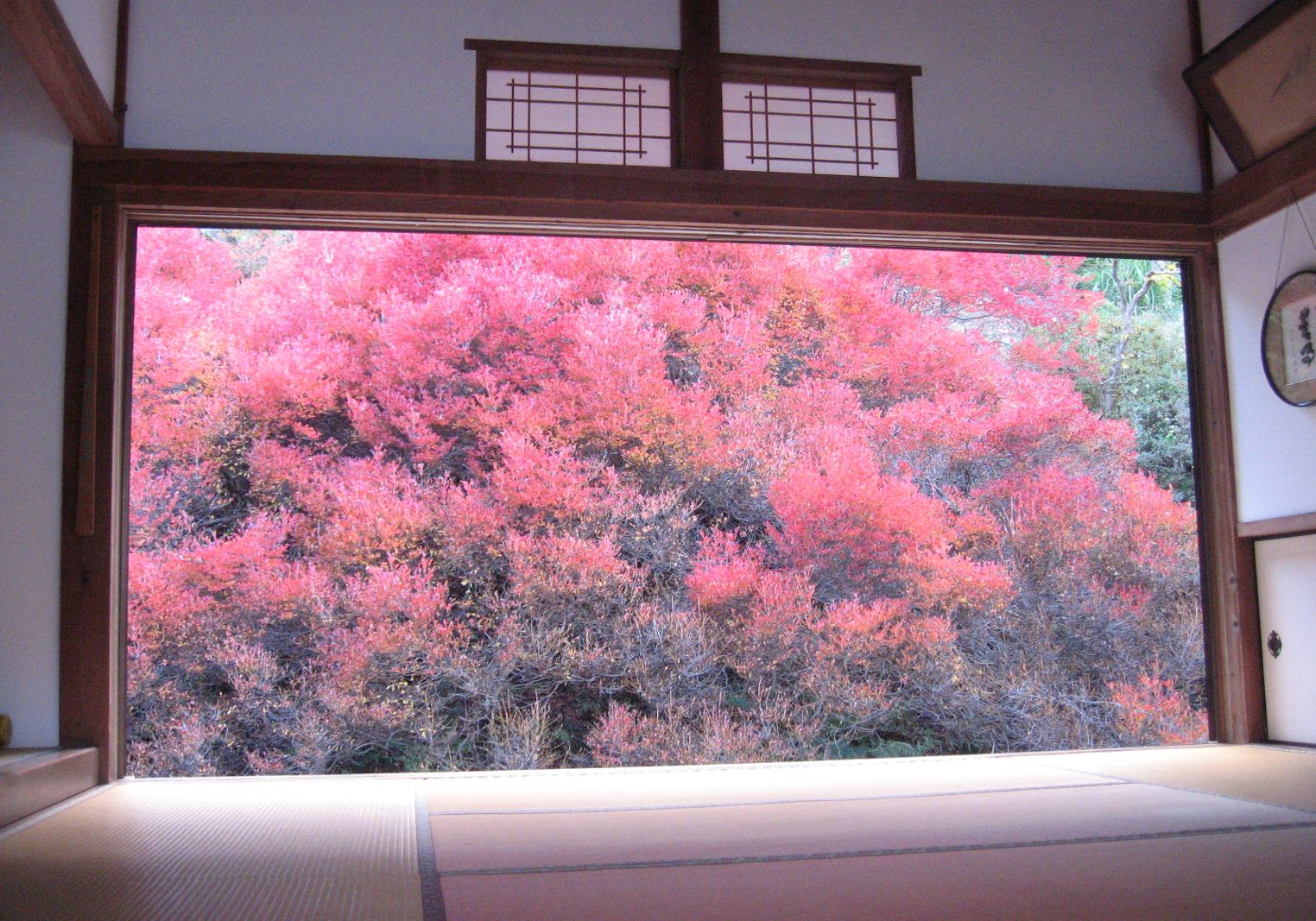 安国禅寺（豊岡市）のドウダンツツジ